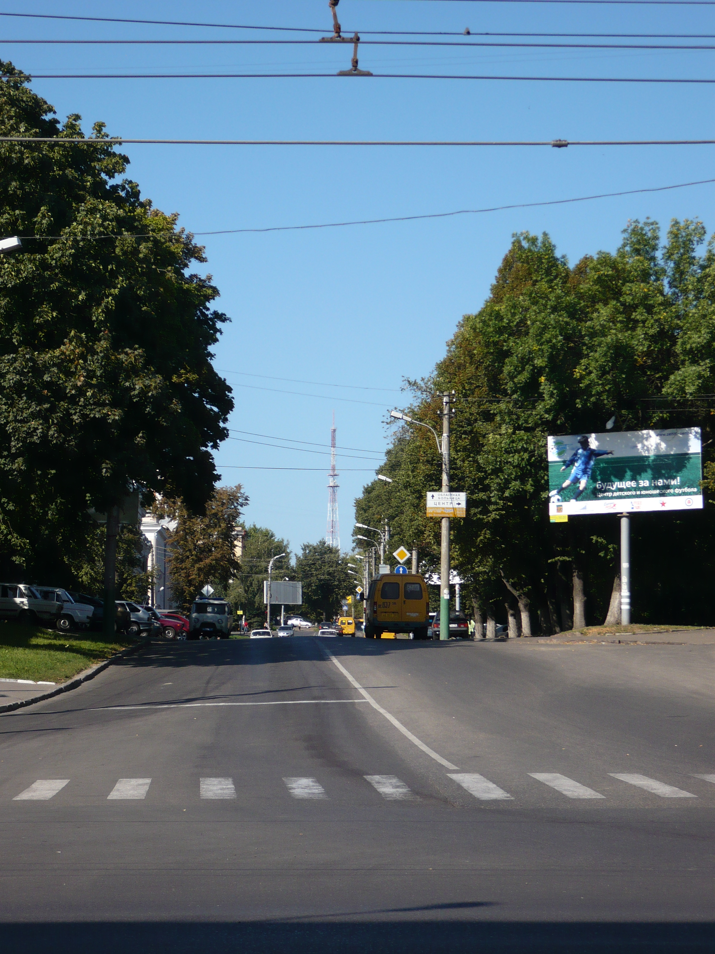 Начало улицы Лермонтова на пересечении с улицами Кирова, Калинина и Замойского. Вдалеке - Пензенская телебашня.